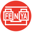 Imaxe de Fenya Ferrol (na orixe) en fondo vermello, primeira empregada en Canido